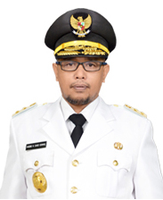 Said Ismail sebagai Wakil Gubernur Kalimantan Tengah